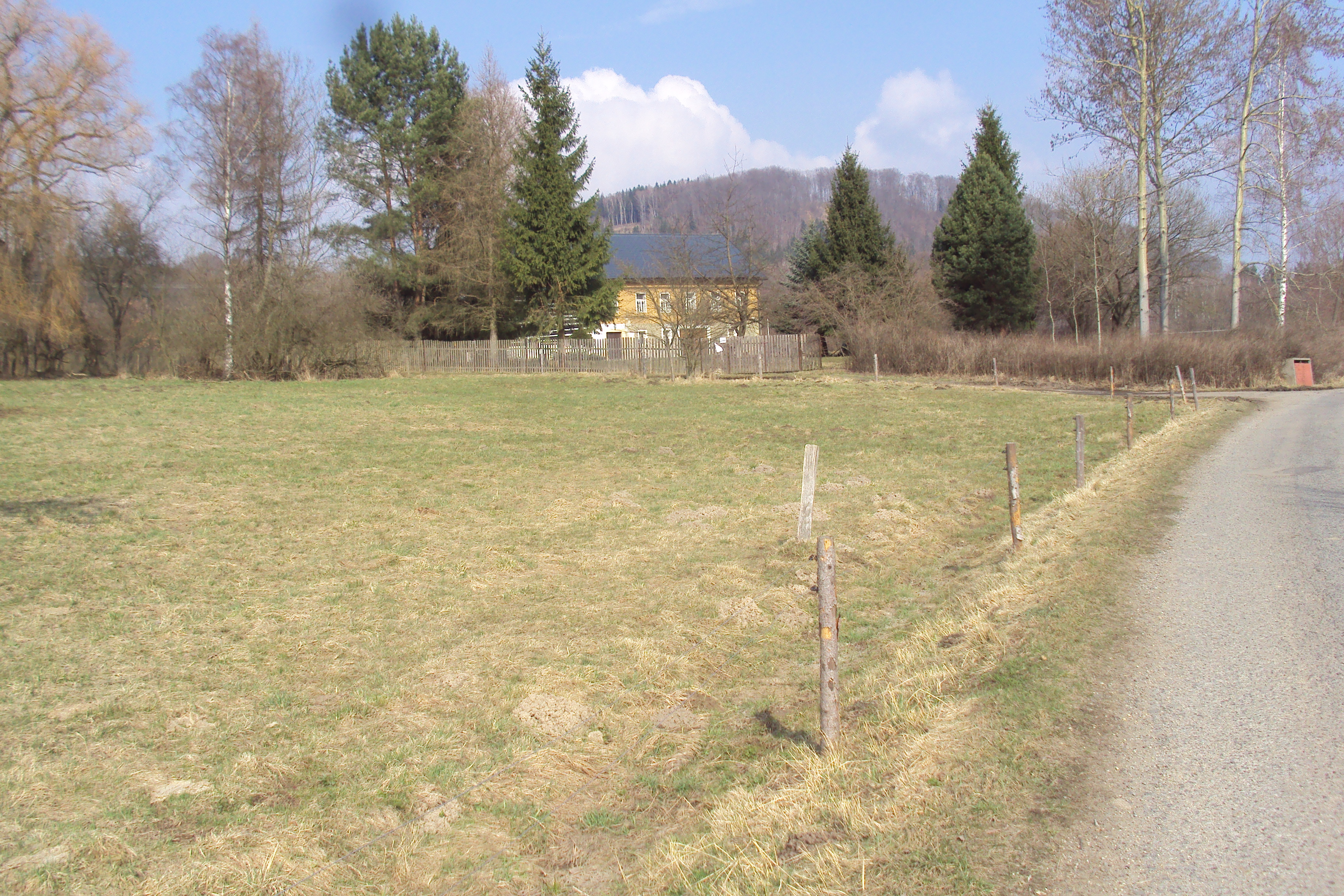 Odloučená vesnička patří pod Cvikov na Českolipsku, u silnice Svojkov - Svitava